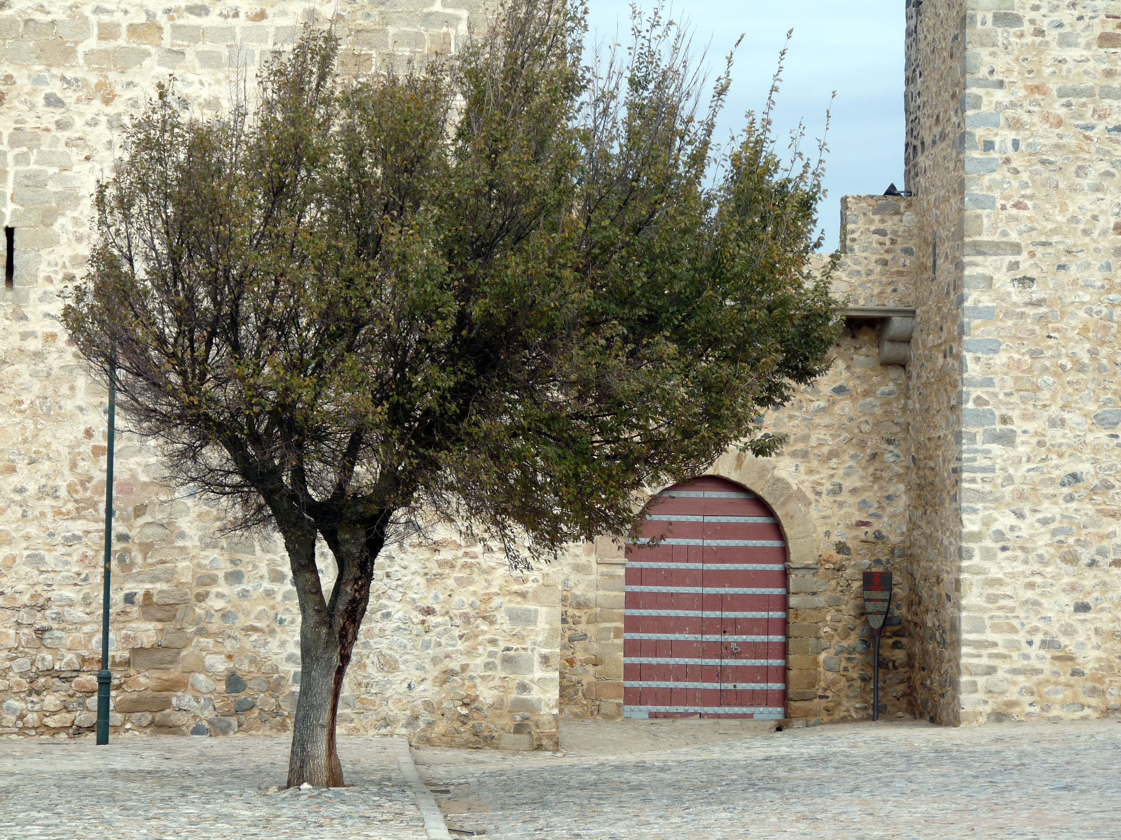 Entrance to Elvas Castle